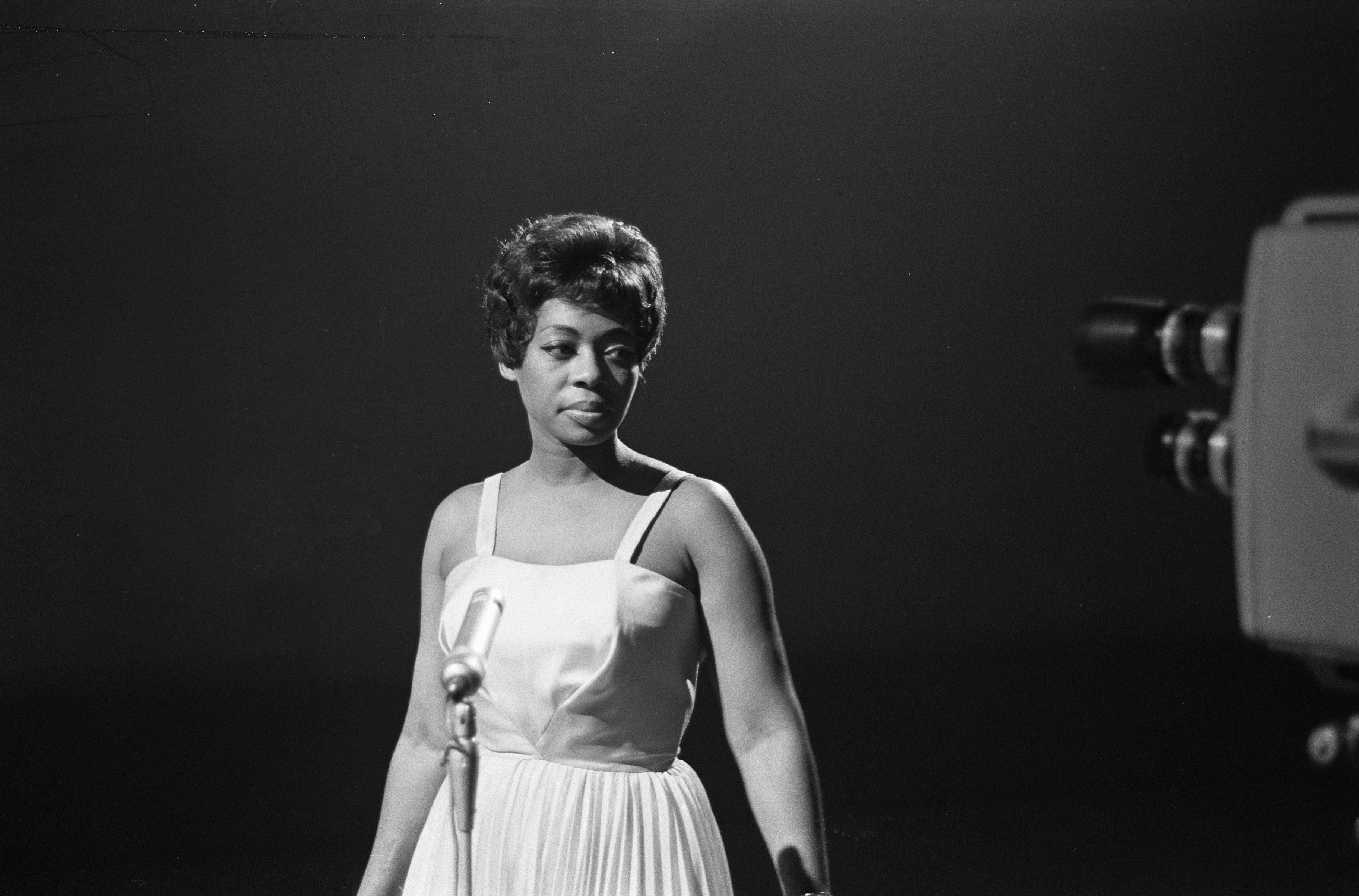 TV Music Hall in Treslong, Donna Hightower (zangeres) Datum 12 december 1962